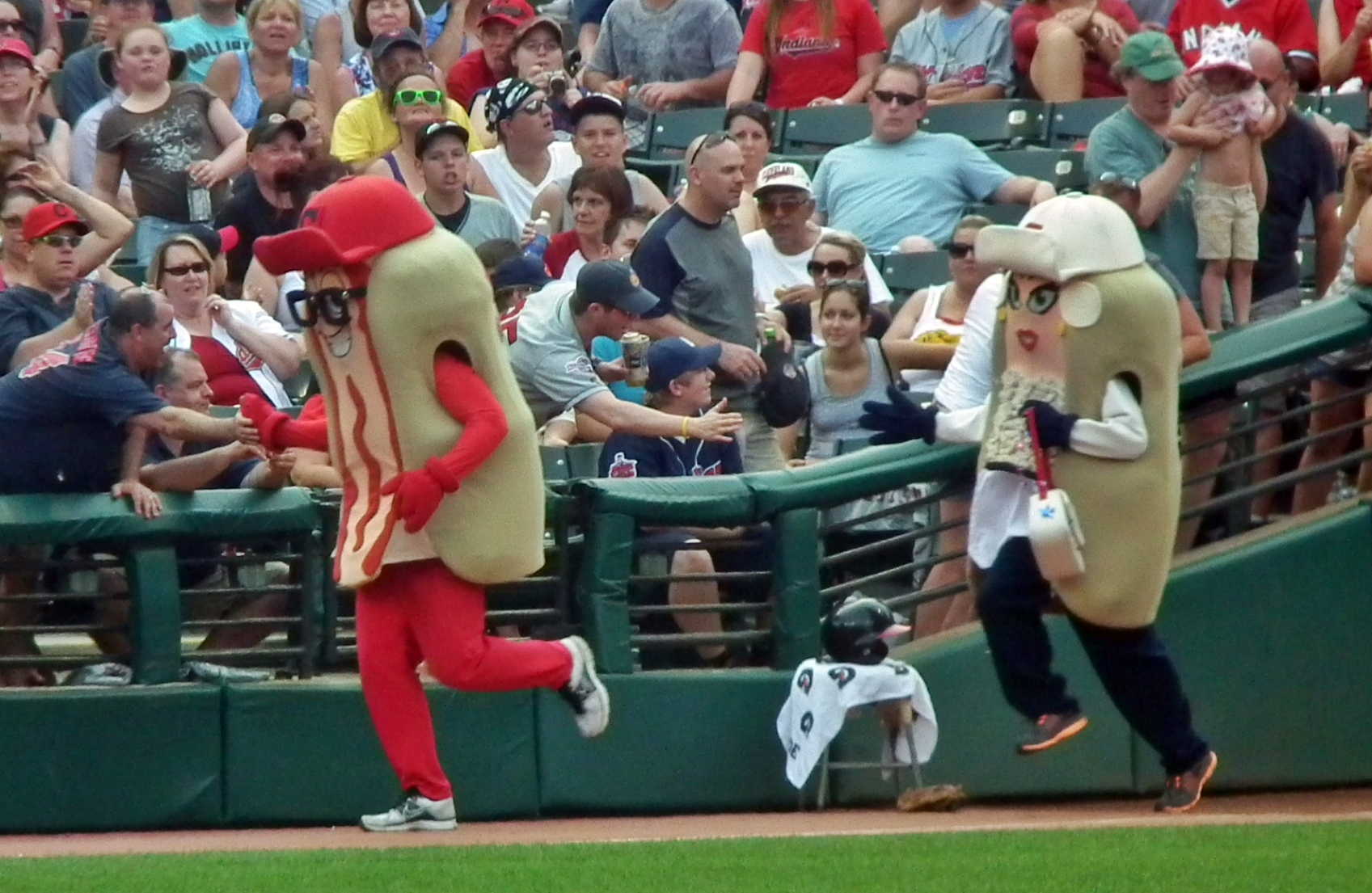 Hot Dog Race